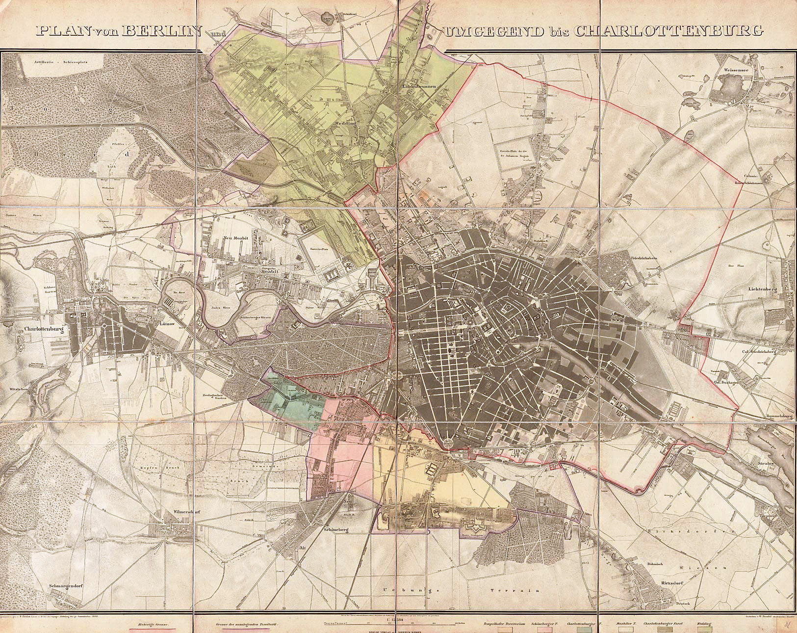 Der Titel steht einzeilig über dem Plan und wird durch eine starke Randüberzeichnung (bis Schäfersee) unterbrochen. Die Karte zeigt in rot die "Bisherige Grenze" und in lila die "Grenze des zulegenden Territorii" der Stadterweiterung von 1861. Die sechs neu hinzugekommenen Gebiete sind koloriert und unter dem Plan in einer Legende benannt.